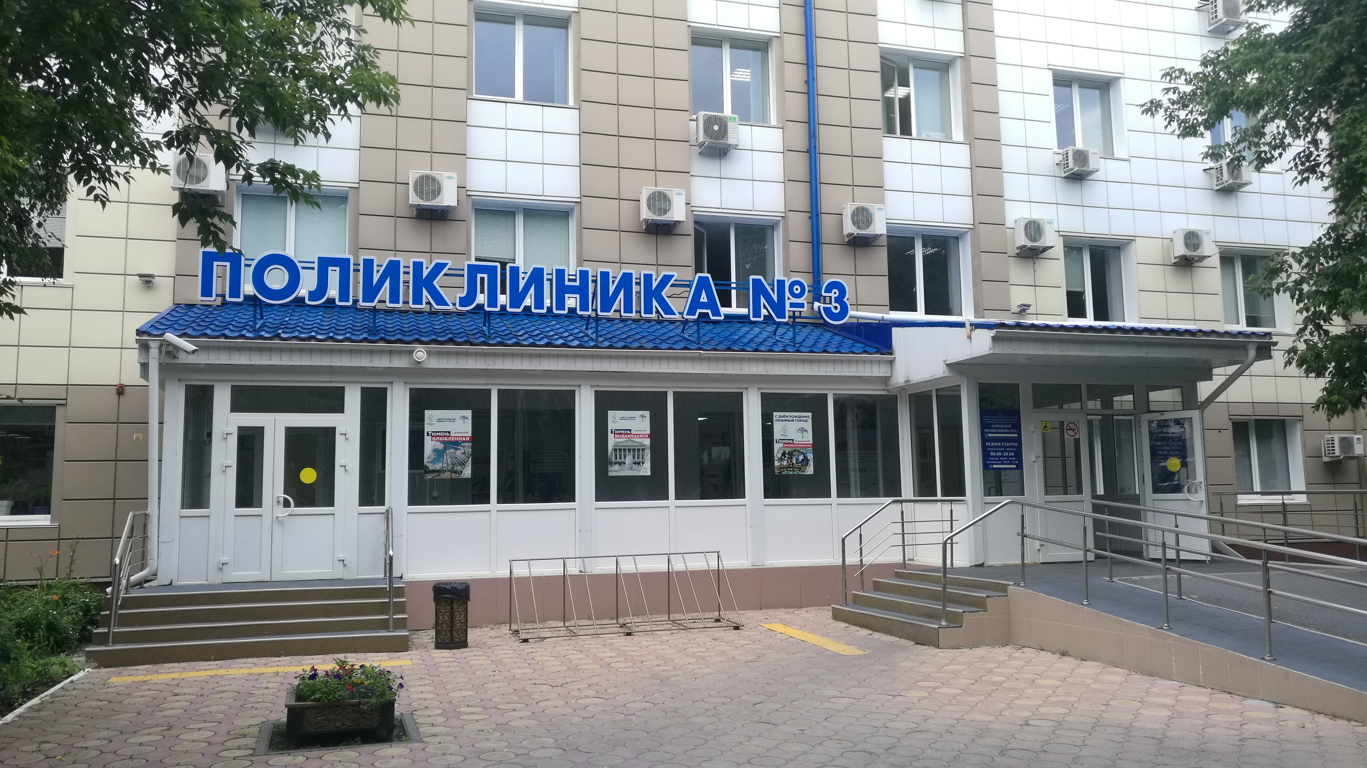 Polikliniko N 3. Tjumeno, Rusio.